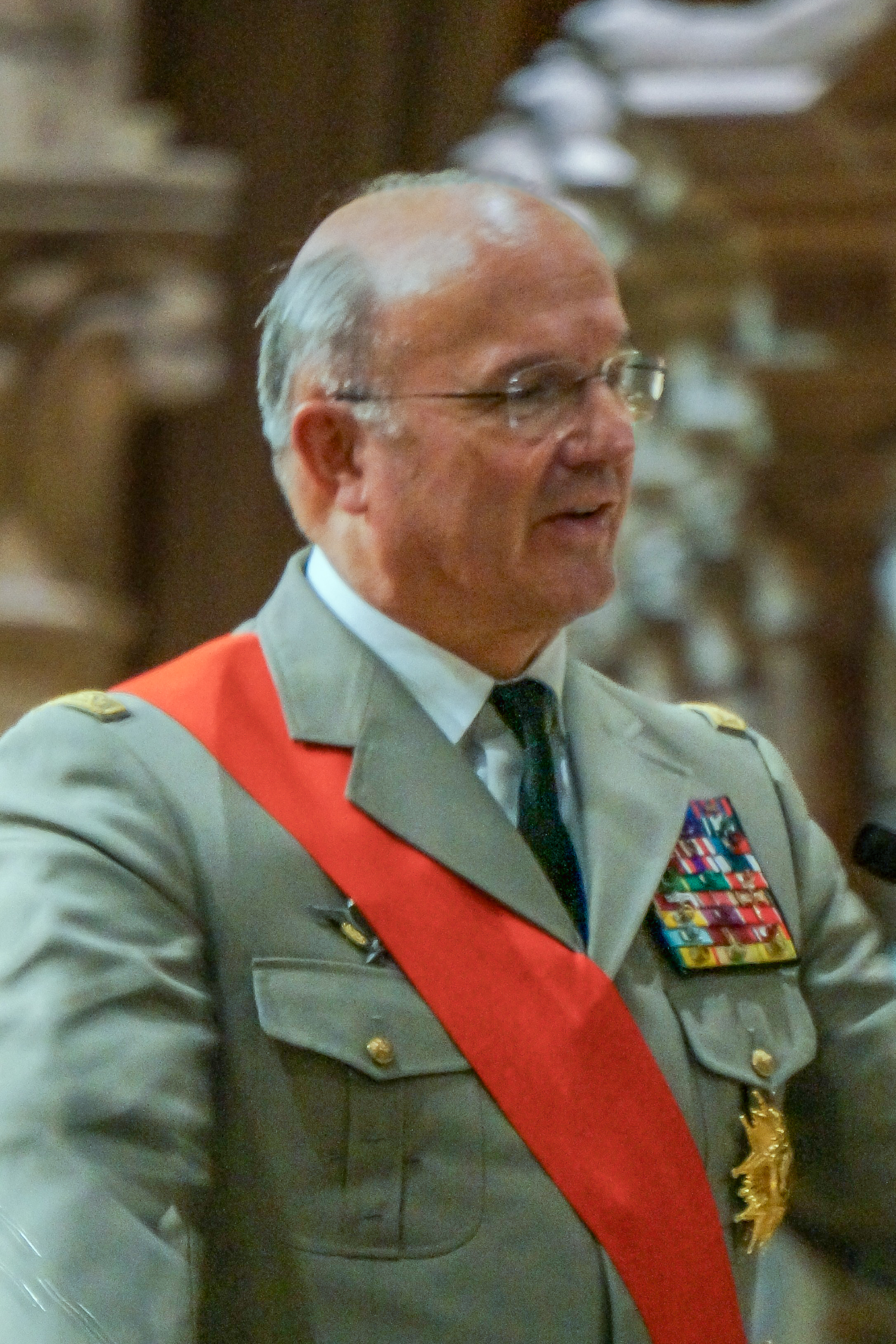 lors du concert de la Légion d'honneur à Reims.